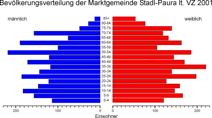 Bevoelkerungspyramide der Marktgemeinde Stadl-Paura laut VZ 2001